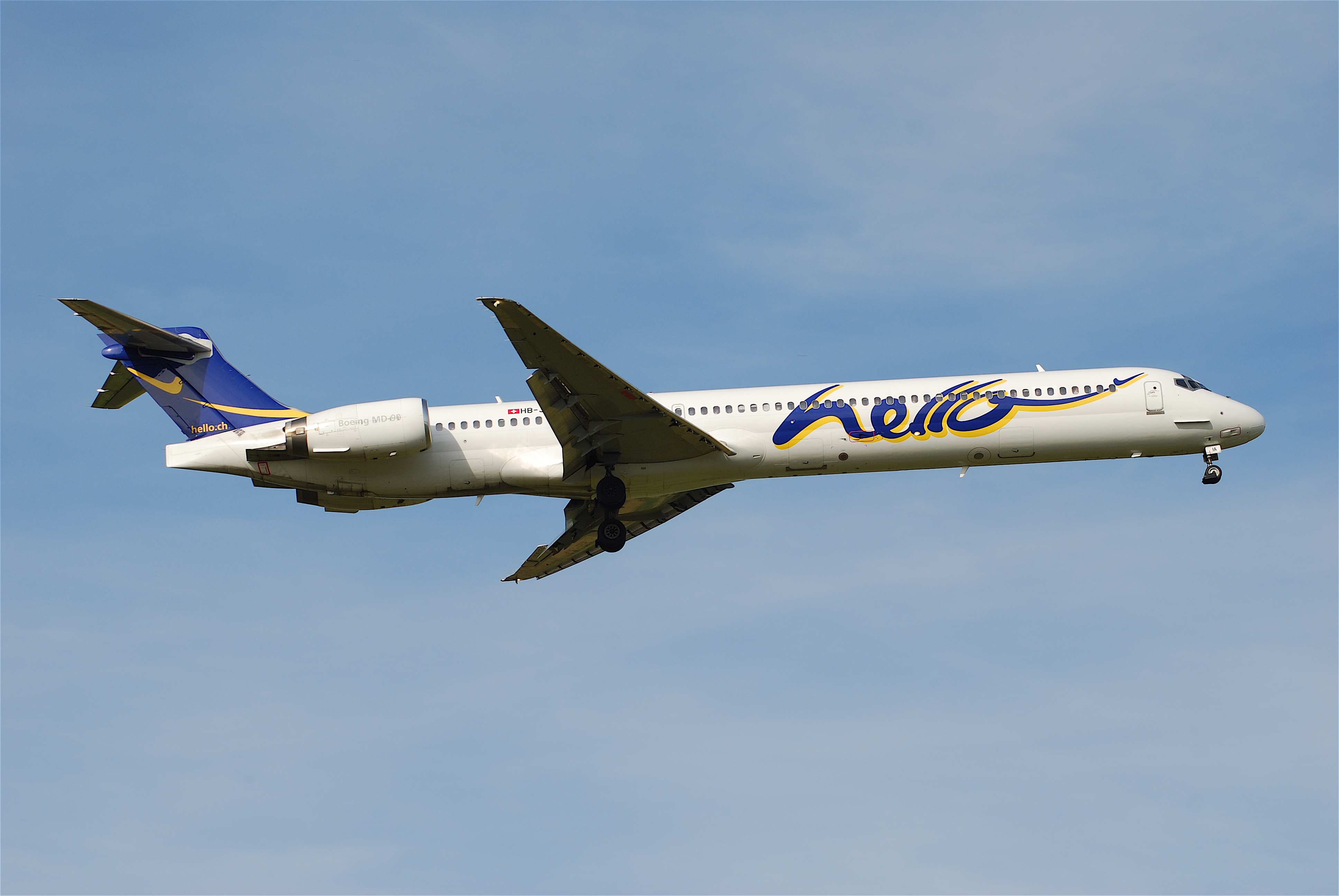 HB-JIA@ZRH;30.06.2007/473cq